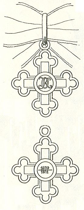 Tekening van Gritzner 1893